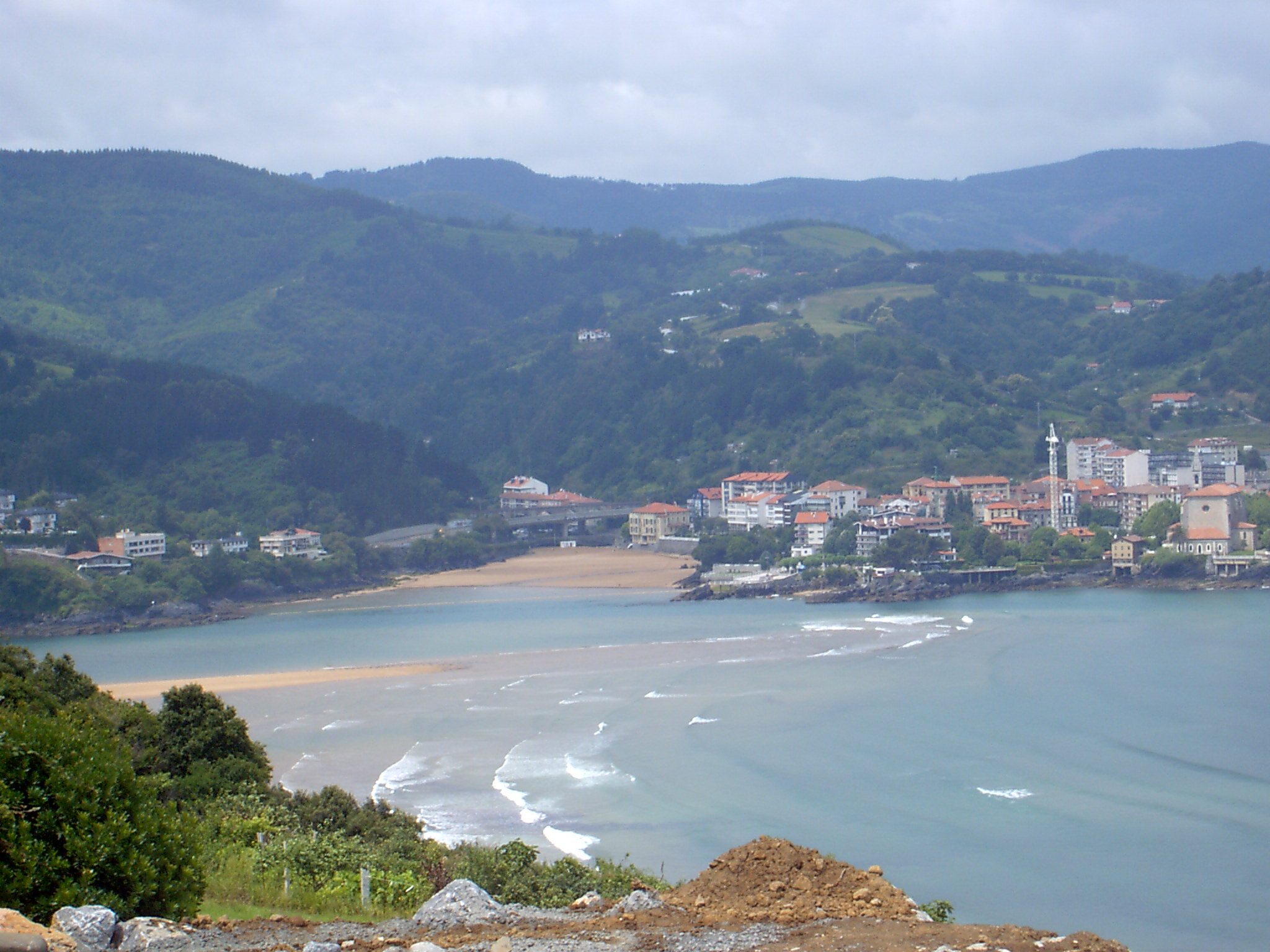 Urdaibai landscape and background Mundaka